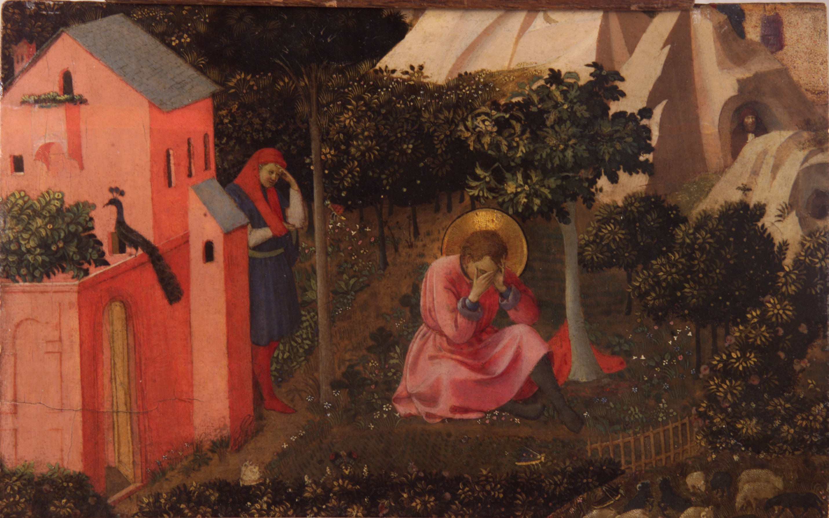 L’iconographie de l’œuvre a fait l’objet de nombreuses exégèses. On s’accorde aujourd’hui à y voir une conversion de saint Augustin: assis sous un figuier dans le jardin de son ami milanais Alype, Augustin est frappé par une manifestation divine. Photographie avant restauration